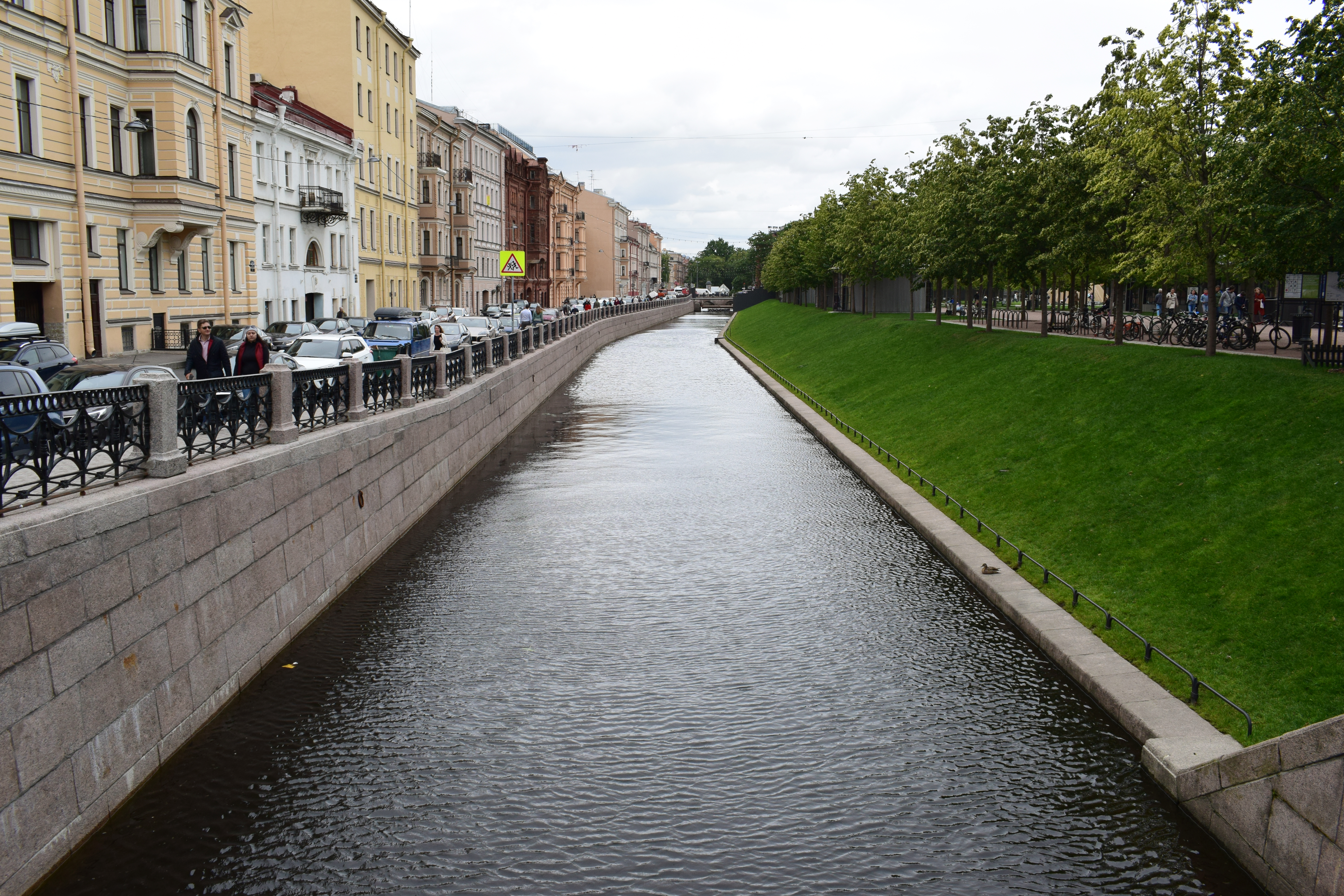 Адмиралтейский канал в Санкт-Петербурге летом 2019 года